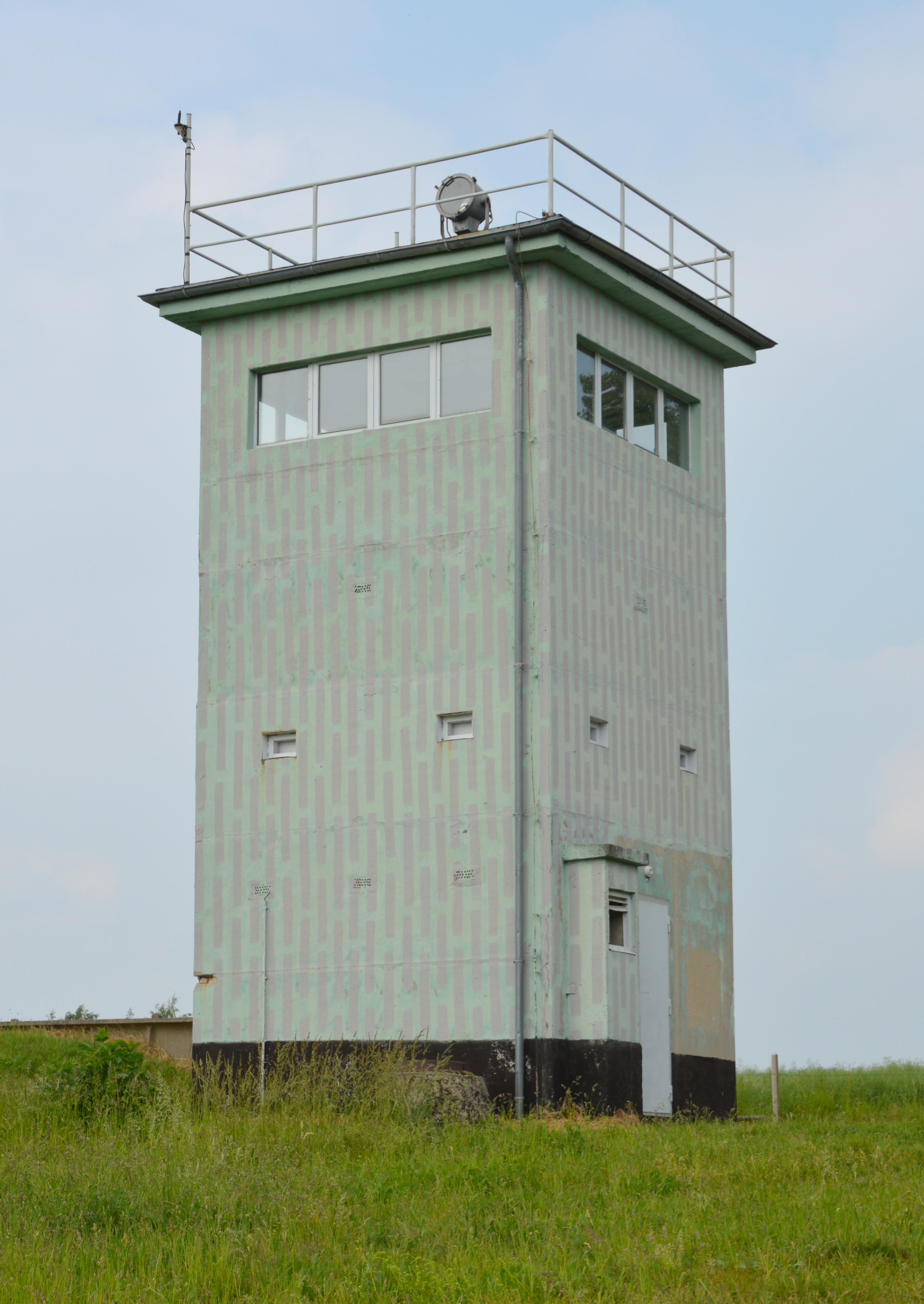 Wachturm Grenzmuseum Hötensleben